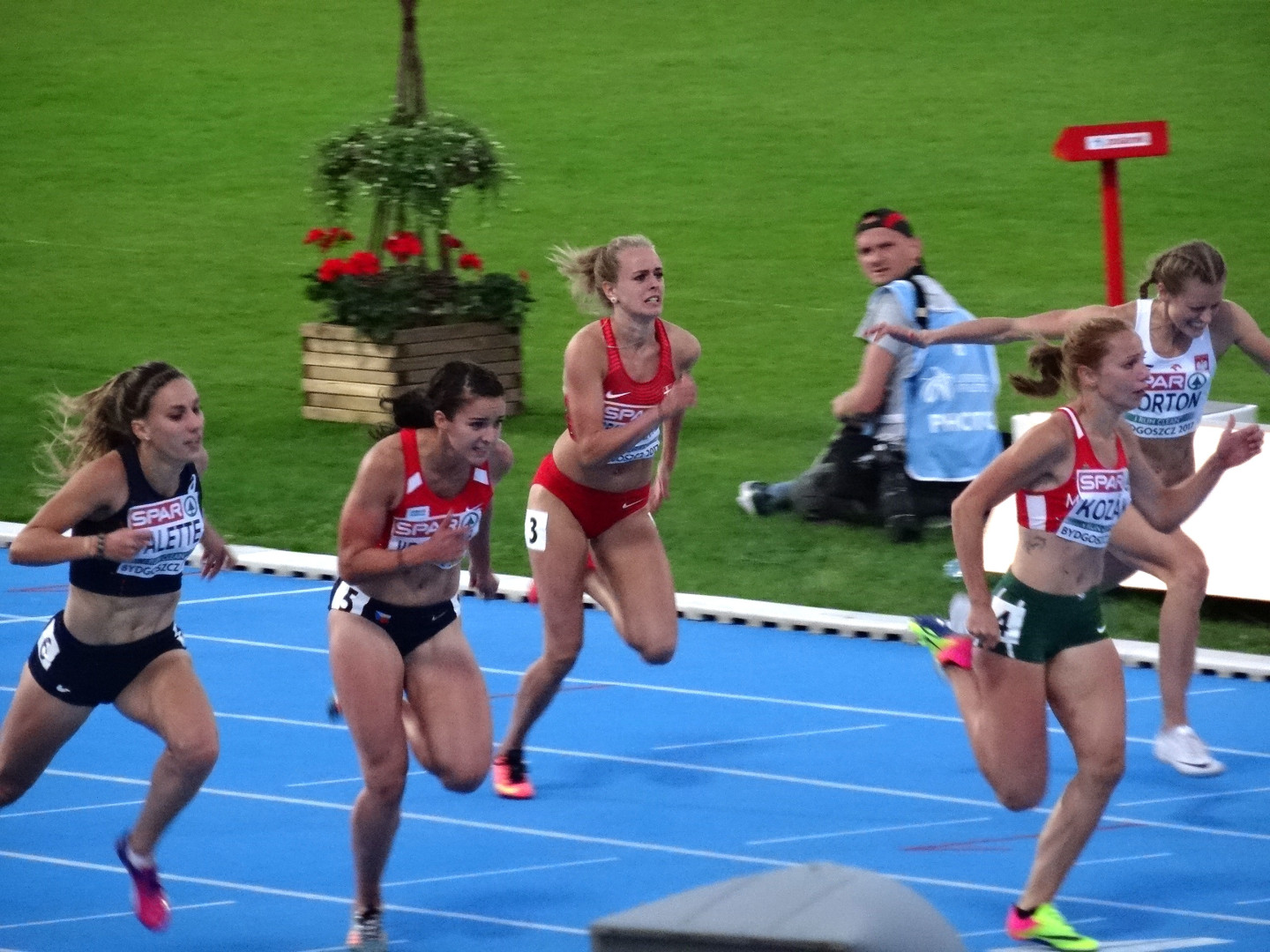 Młodzieżowe Mistrzostwa Europy w Lekkoatletyce U23 w Bydgoszczy 13-16 lipca 2017, półfinał biegu na 100 m przez płotki kobiet